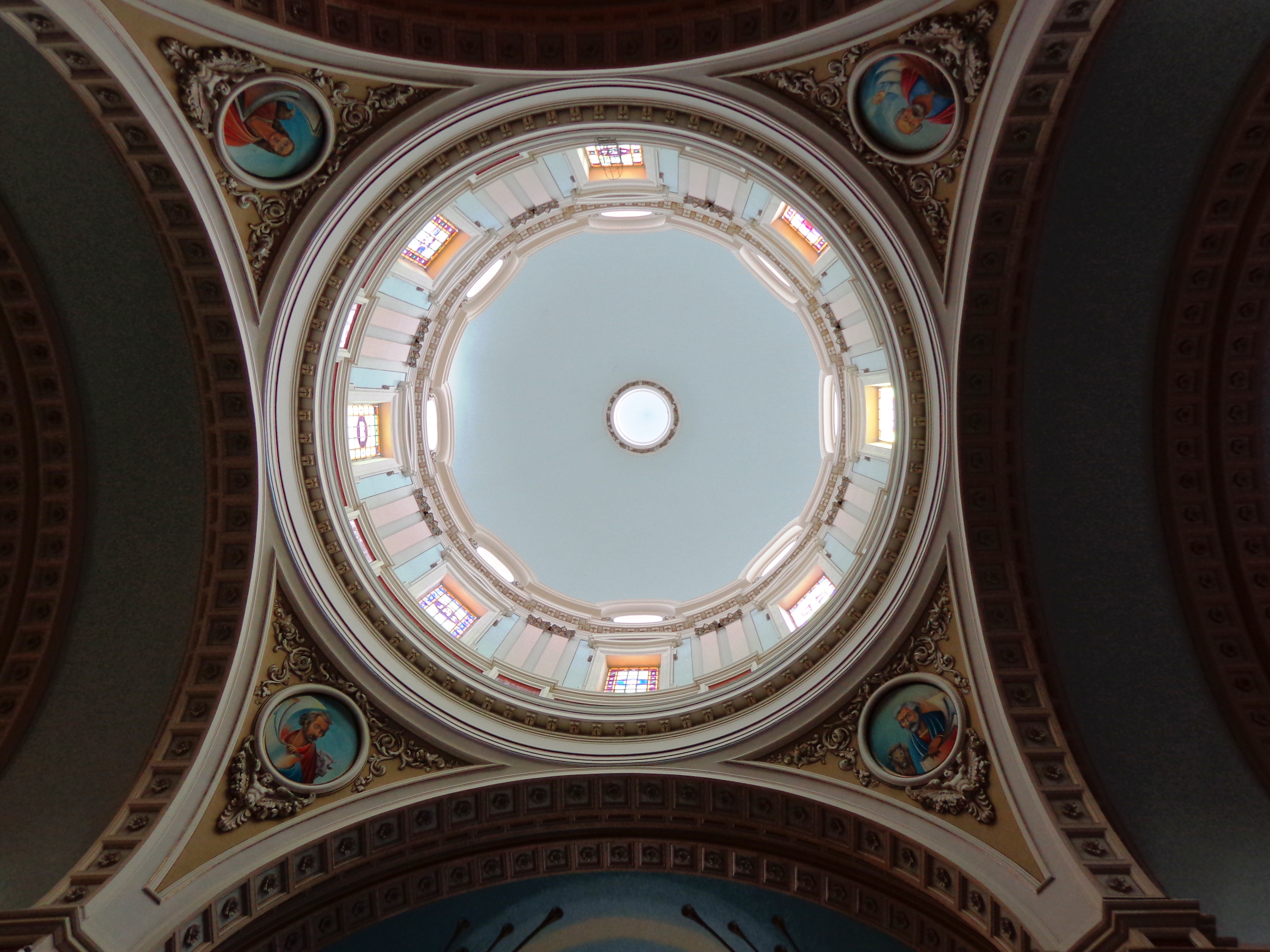 Interno Cupola Basilica Minore di San Sebastiano Barcellona Pozzo di Gotto.